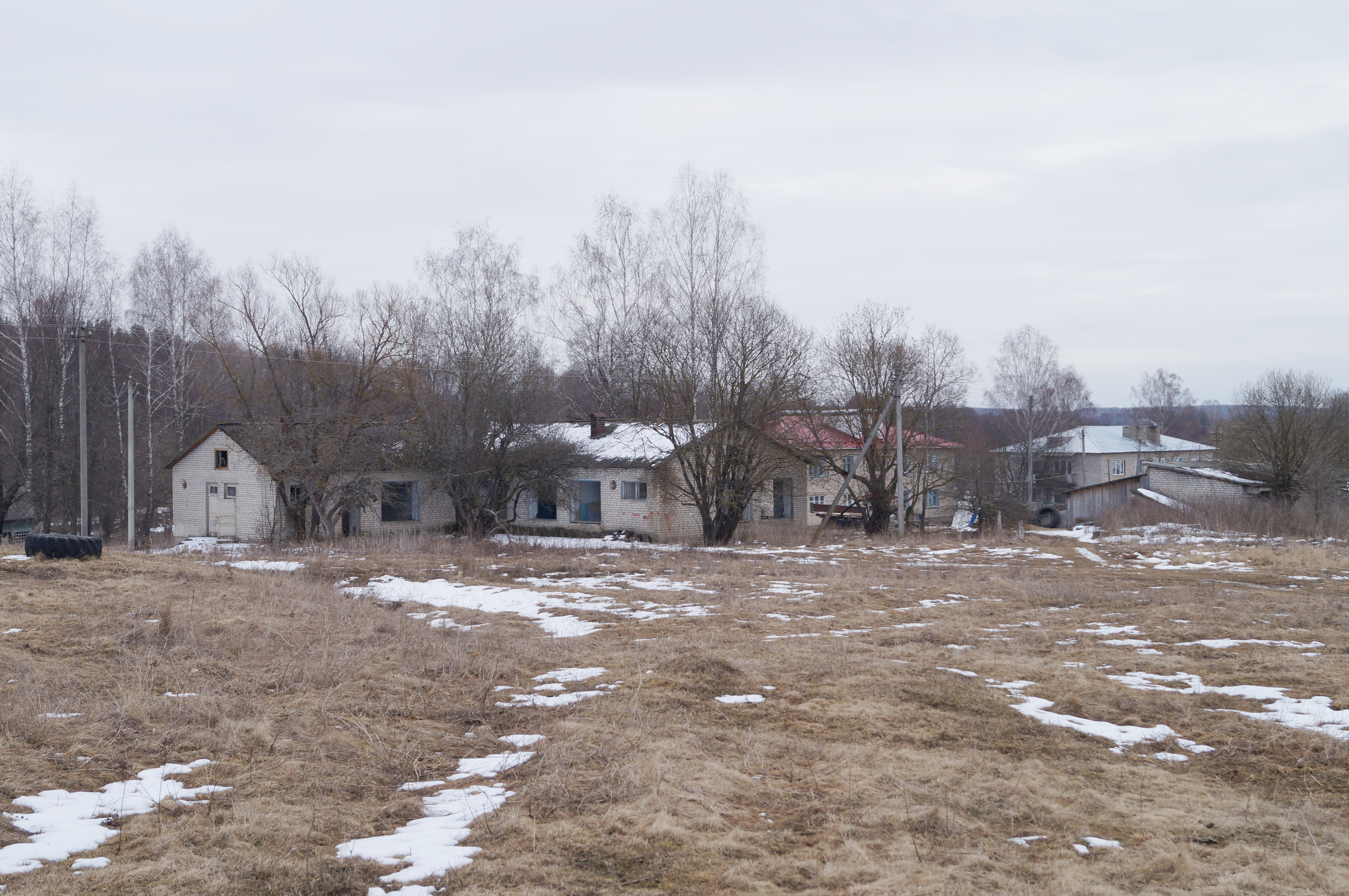 Кочуково (Думиничский район)